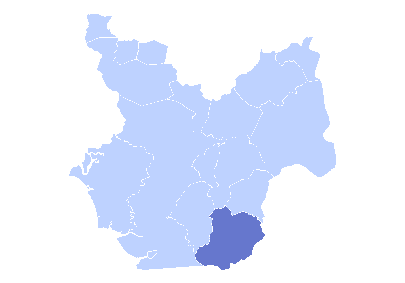 Położenie gminy El Triunfo na mapie departamentu